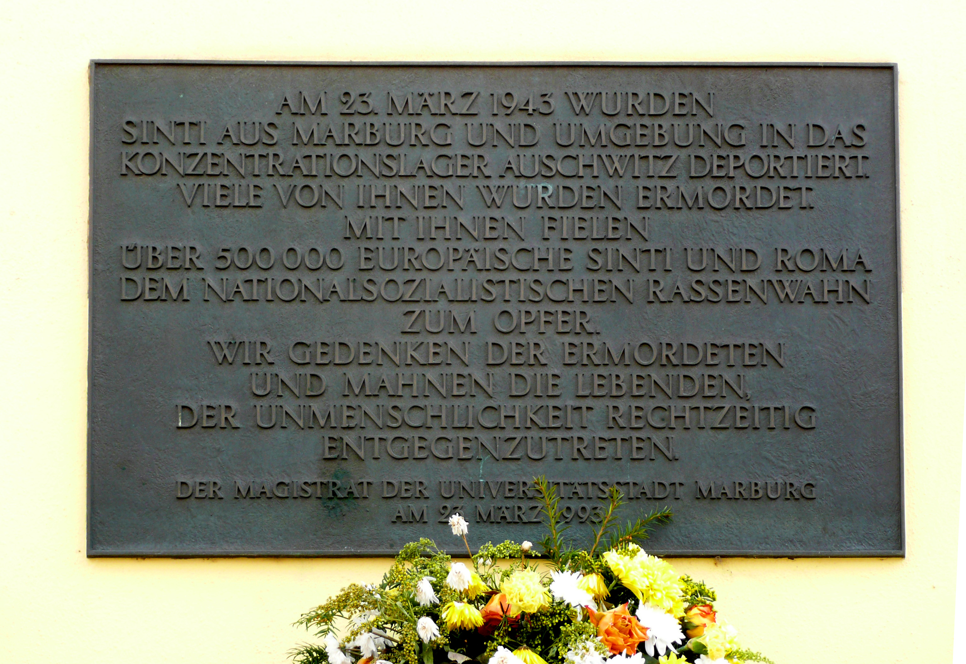 Gedenktafel für die 1943 deportierten Sinti aus Marburg und Umgebung. 1993 am ehemaligen Kreishaus (heute Bauamt) angebracht. Inschrift: “Am 23. März 1943 wurden Sinti aus Marburg und Umgebung in das Konzentrationslager Auschwitz deportiert. Viele von Ihnen wurden ermordet. Mit ihnen fielen über 500.000 europäische Sinti und Roma dem nationalsozialistischen Rassenwahn zum Opfer. Wir gedenken der Ermordeten und mahnen die Lebenden, der Unmenschlichkeit rechtzeitig entgegenzutreten. Der Magistrat der Universitätsstadt Marburg am 23. März 1993”